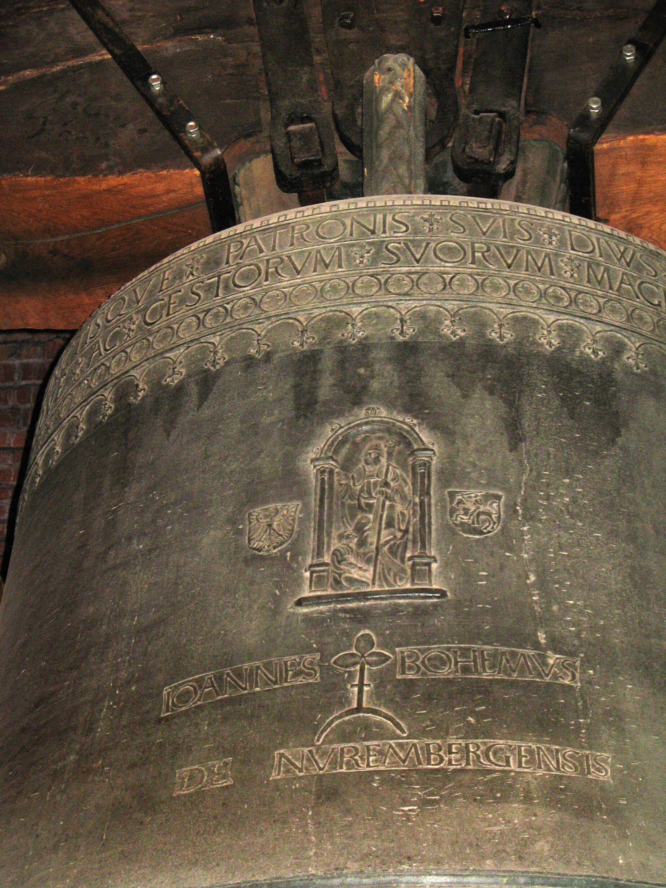 Wawel in Kraków, Poland